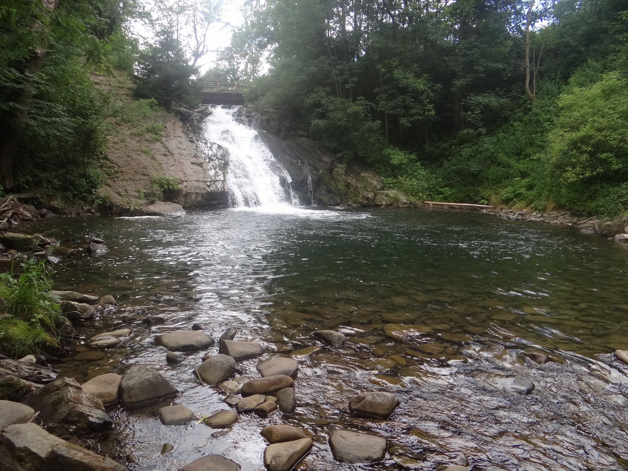 Wodospad w Sopotni Wielkiej